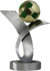 Troféu do Campeonato Brasileiro - Série B